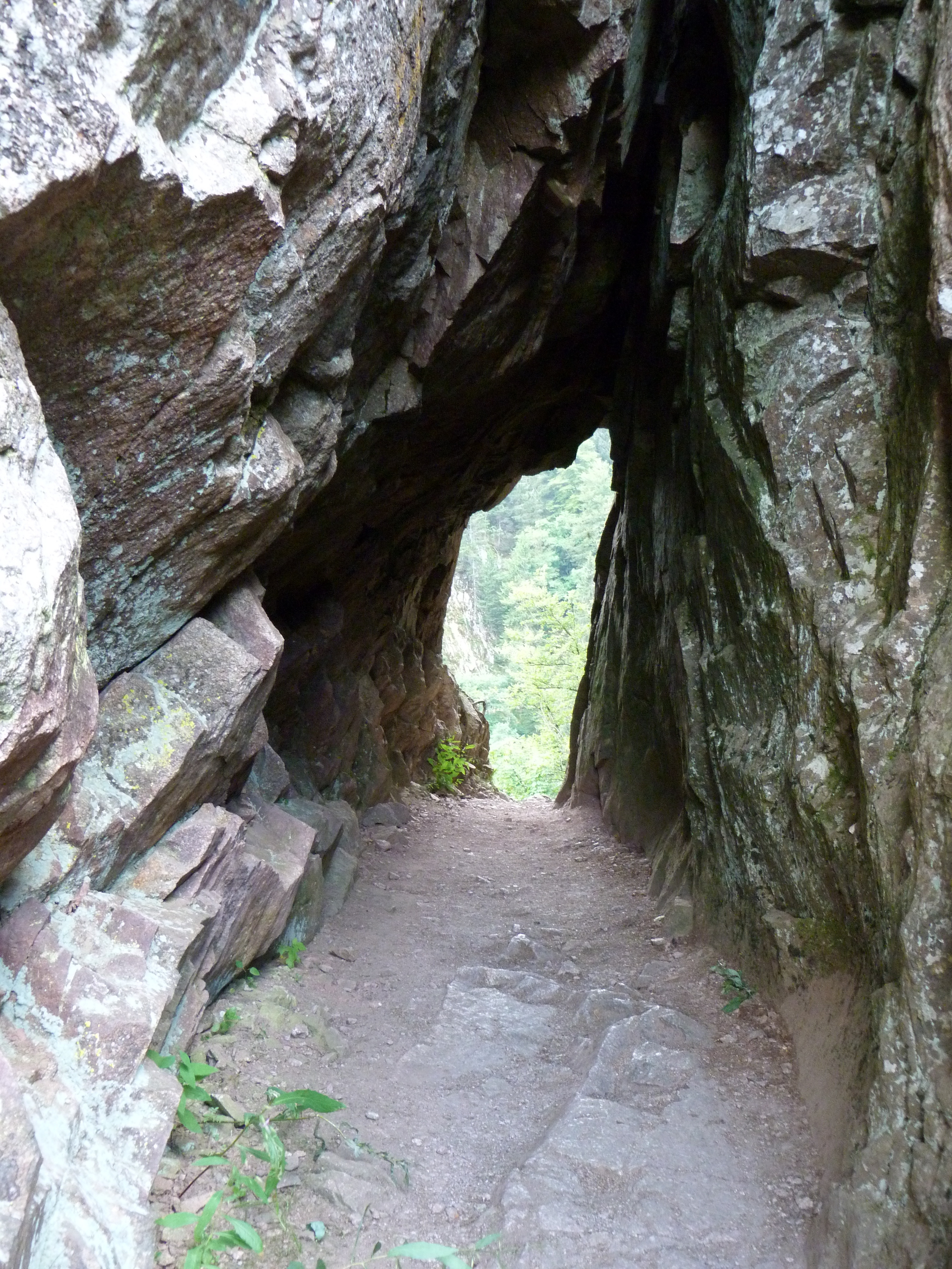 Passage du sentier des Roches (massif des Vosges).